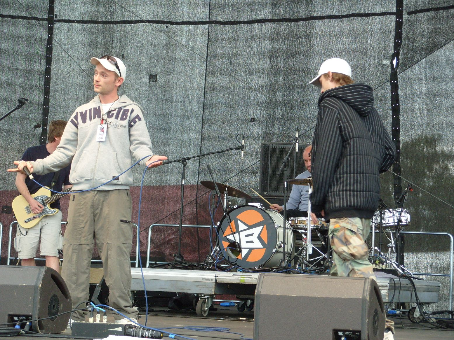 Bow Wave na Planet Festivalu 2008